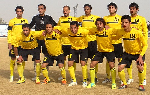 لقطة لنادي الكرخ موسم 2011-2012 من تصوير